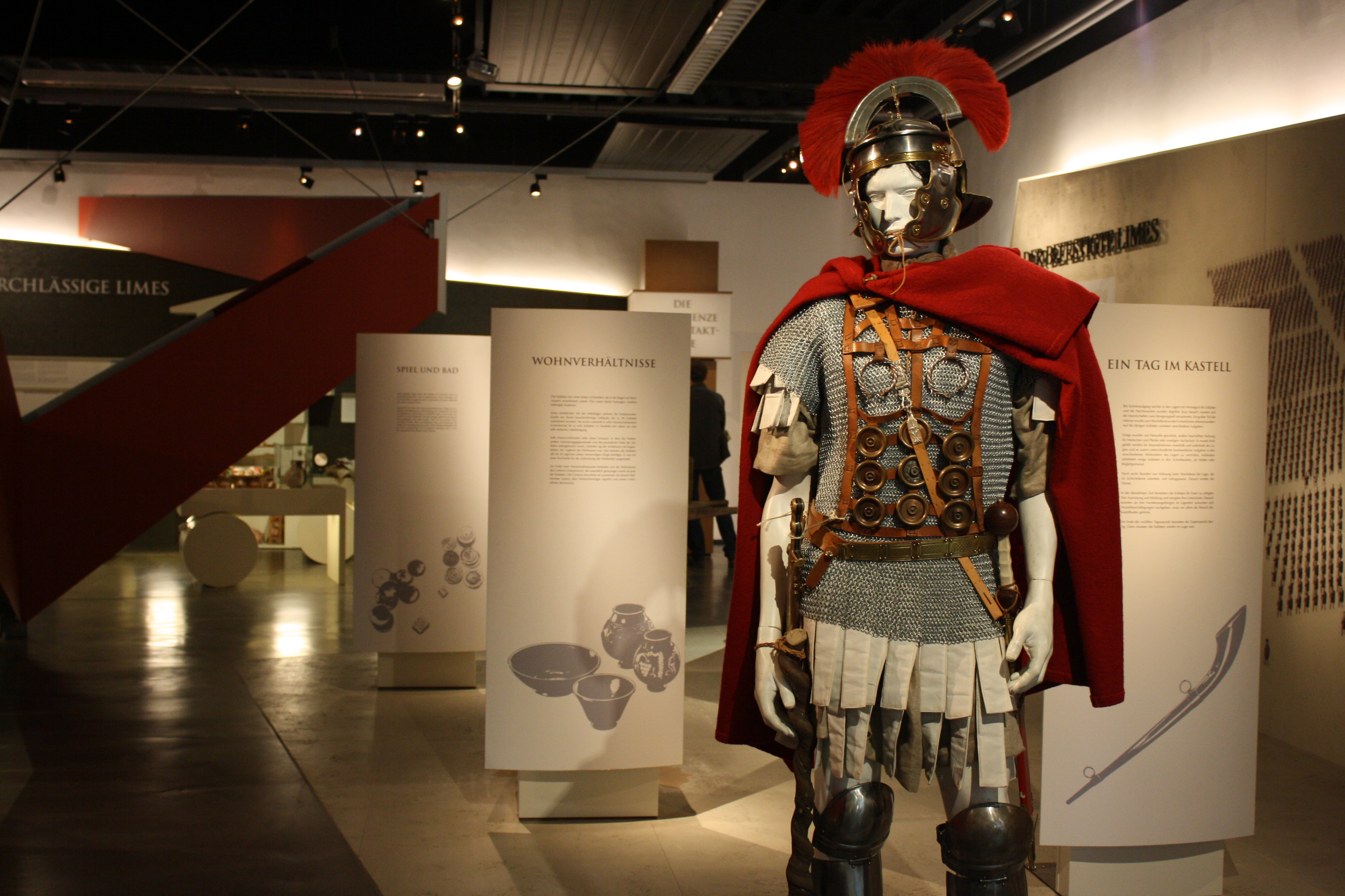 Ausstellung zum Leben der Römer am Limes mit allen Aspekten